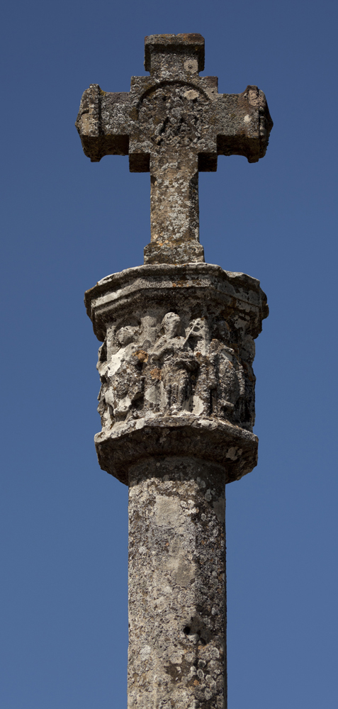 unidentified Spain